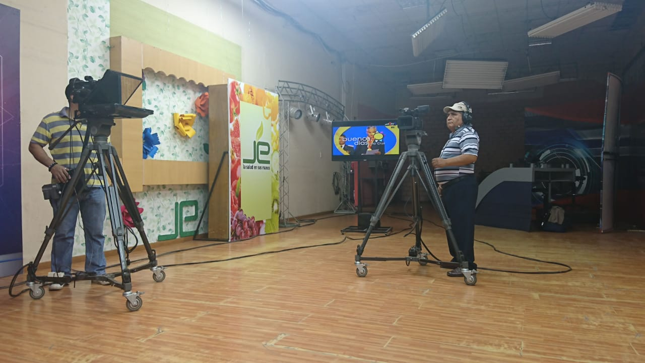 Estudio de grabación en la ciudad de Santa Cruz, parte de las instalaciones de la Universidad Autónoma Gabriel René Moreno.